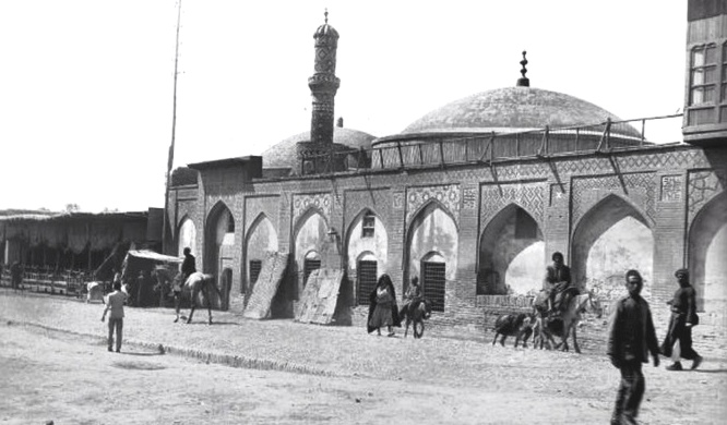 جامع الأزبك من مساجد العراق التاريخية، ويقع في جانب الرصافة من مدينة بغداد ويبعد عن جامع المرادية مسافة مائة وثلاثون مترا تقريباً، وبني هذا الجامع وشيد في عام 1093هـ/ 1682م من قبل (عبد العزيز خان) الذي كان السلطان على ولاية الأزبك، وكان بناؤه في المكان الذي دفن فيهِ السلطان السابق لأوزبكستان (إمام قولي خان) الذي مر ببغداد في طريقهِ إلى مكة لأداء فريضة الحج لكنهُ توفى في هذا المكان ودفن فيهِ عام 1650م. وتم تشييد هذا الجامع على قبرهِ بعد مدة لا تقل عن ثلاثين عاما وكانت الوفاة في زمن والي بغداد حسين باشا